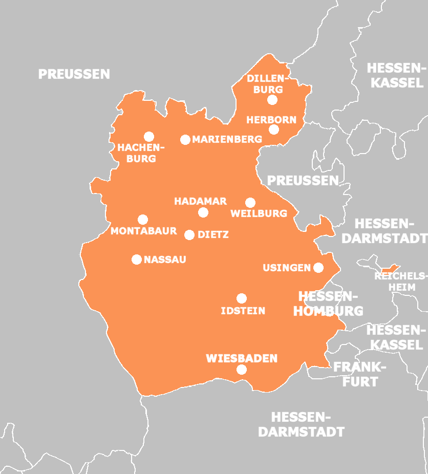 Herzogtum Nassau 1848